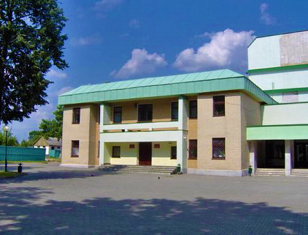 Файл изображает бывшее здание синагоги, а теперь это часть дома культуры в городе Каменец, Республика Беларусь.